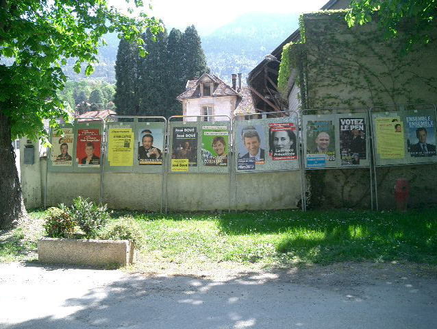 Affiches électorales lors des élections présidentiels françaises de 2007